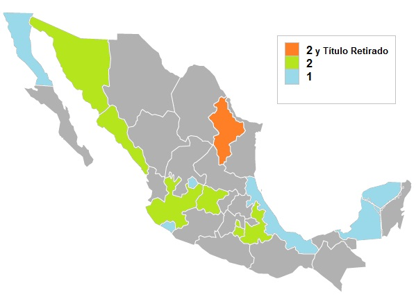 NBMMéxico